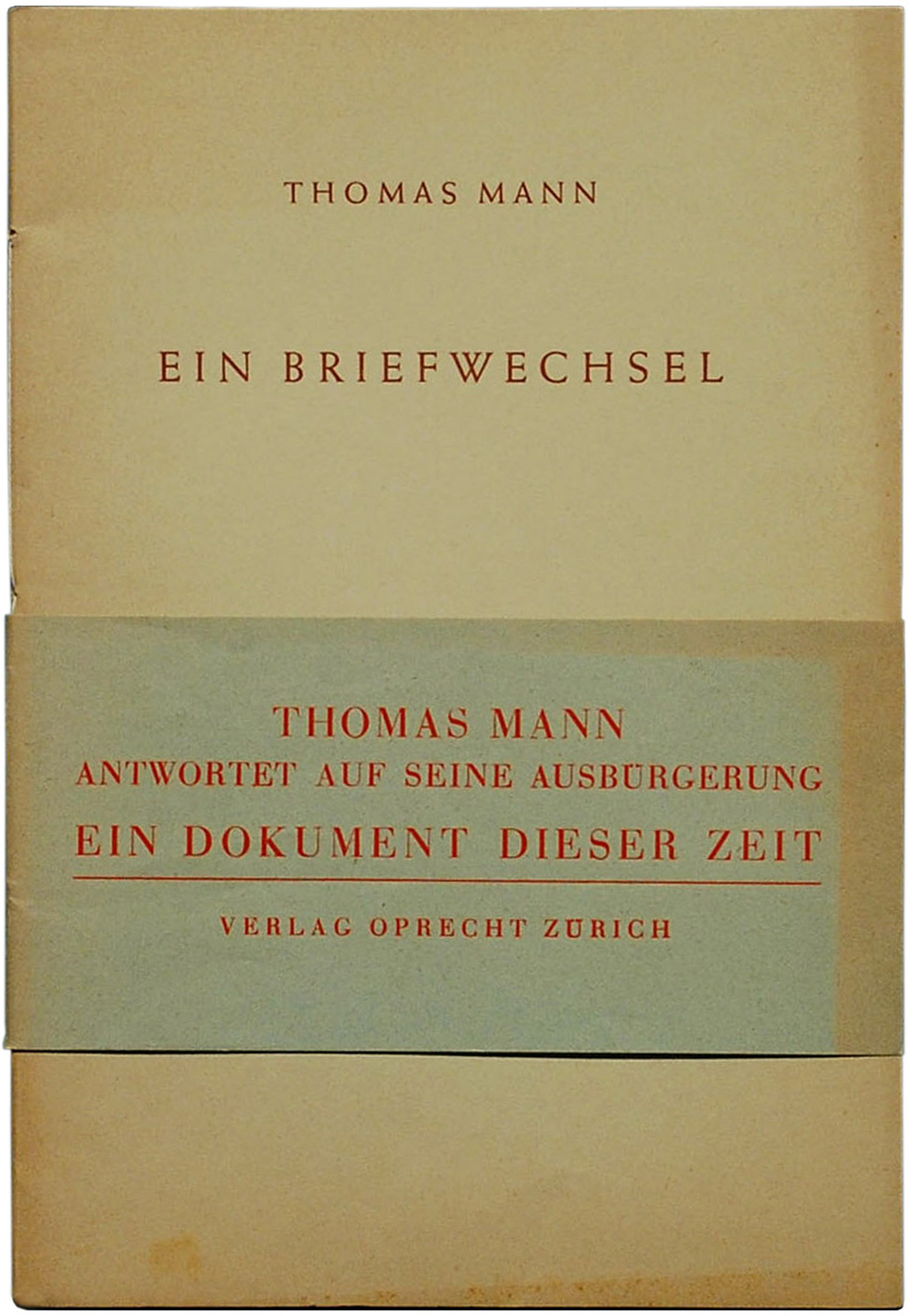 Thomas Mann: Ein Briefwechsel. Zürich: Oprecht 1937, 16 Seiten. Potempa G 632.1 (Erstdruck). Original-Broschur 8° (22,7 x 15,5 cm) mit Original-Buchbinde. Lichtrand.